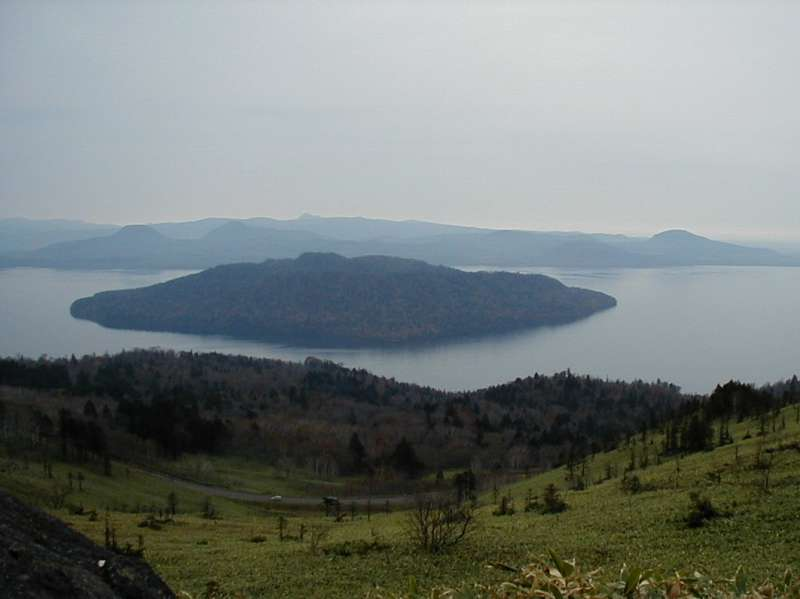 Lake Kussharo, Hokkaido, Japan